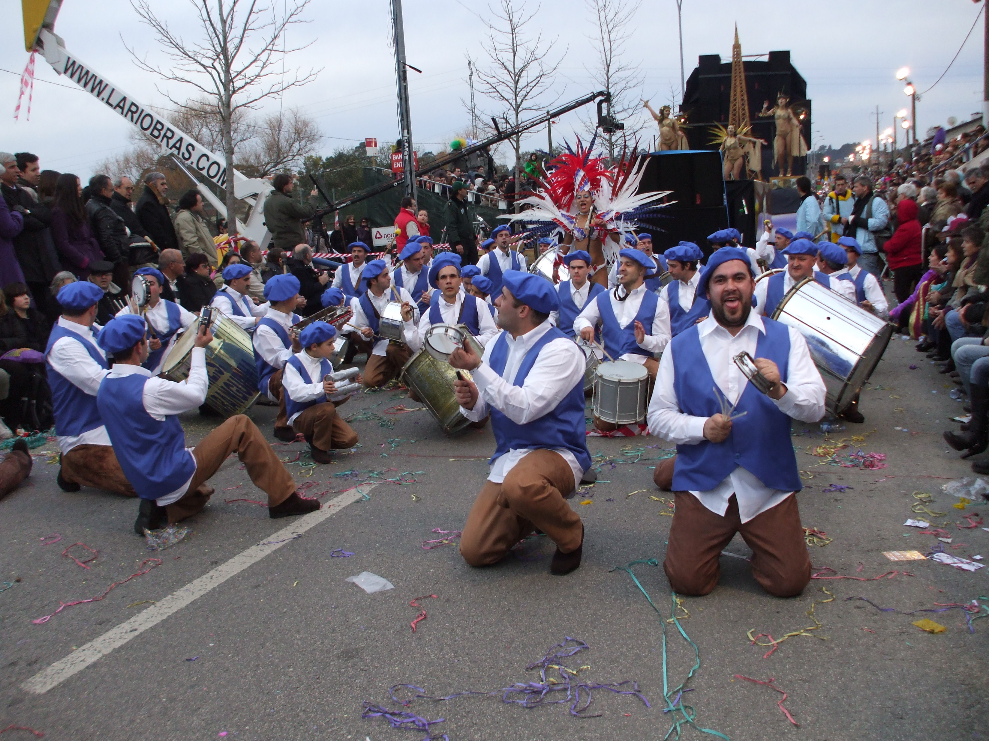 Carnaval de Ovar 2010 (10)